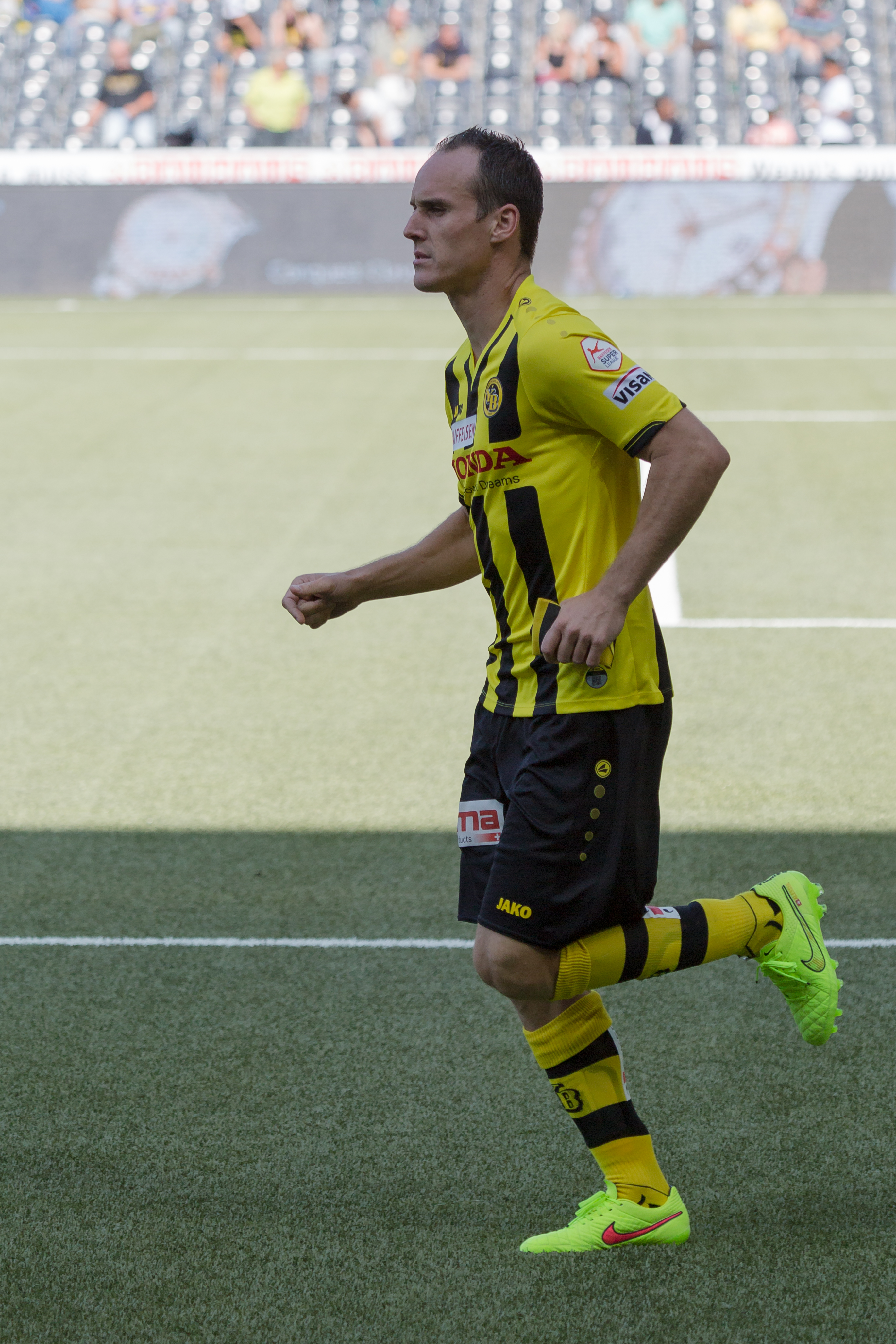 Steve von Bergen beim Spiel des BSC Young Boys gegen den FC Luzern